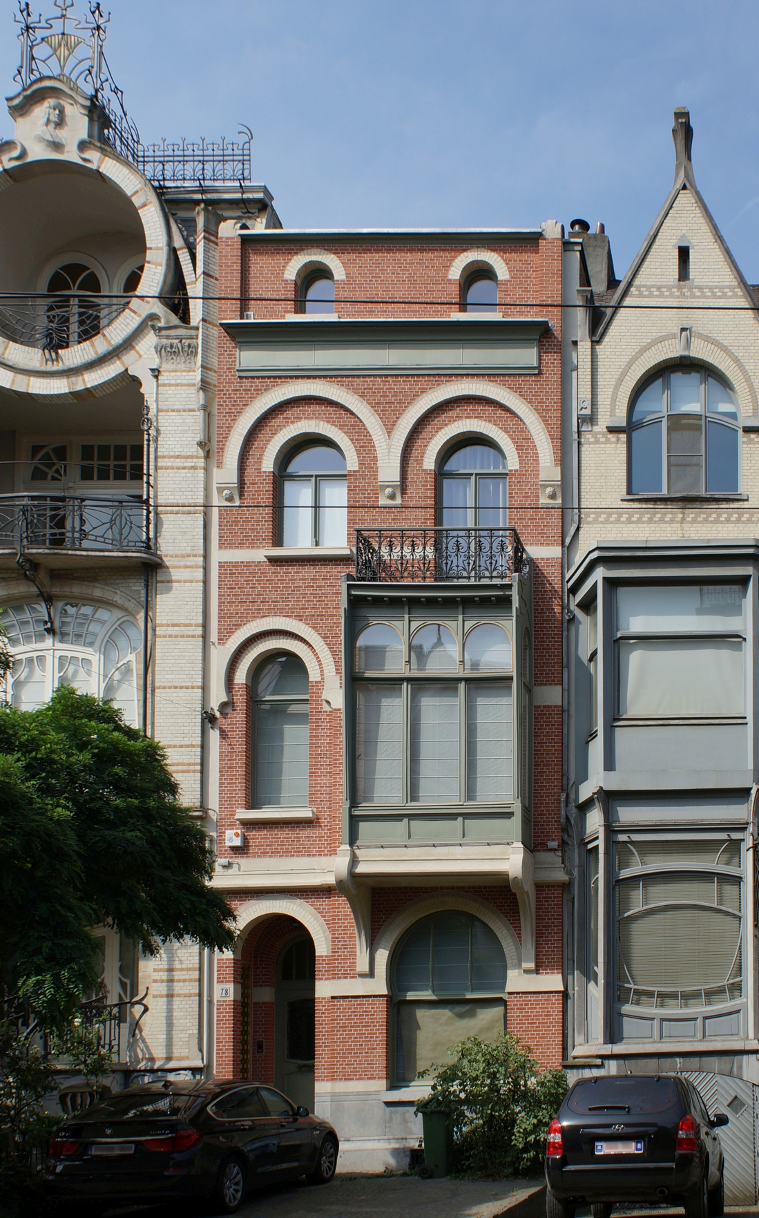 Berchem (Antwerpen), Cogels-Osylei 78. Burgershuis in "Art Nouveau"-stijl ontworpen door architect Jules Hofman.